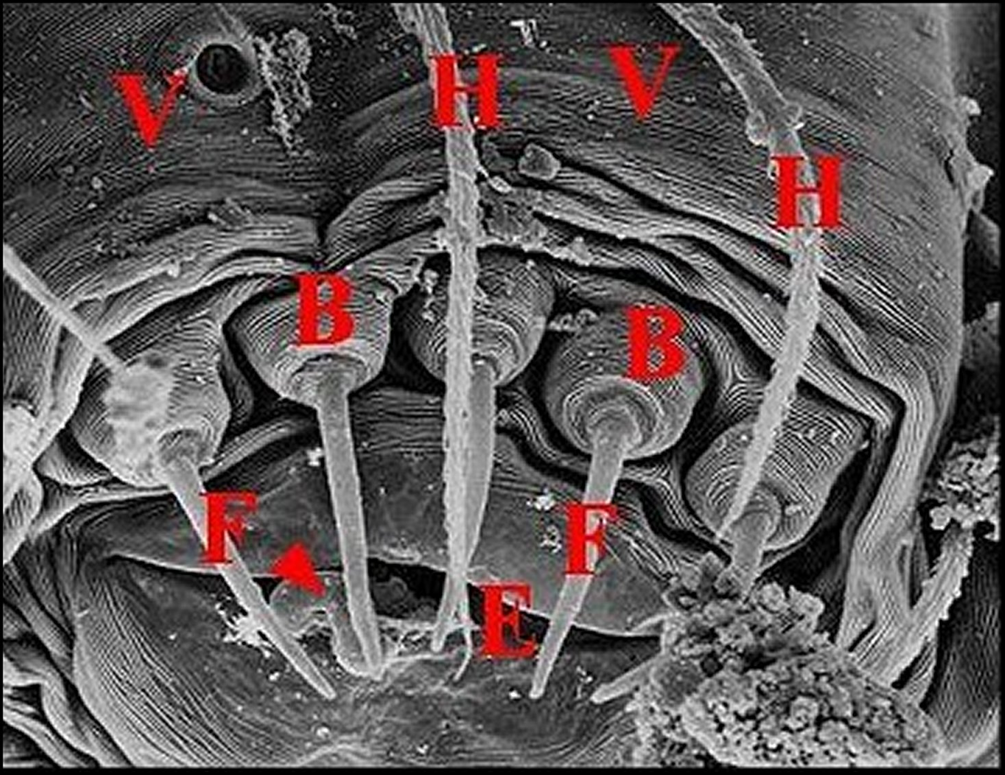 Fusules épigastriques de Ochyrocera thibaudi vues au microscope électronique à balayage